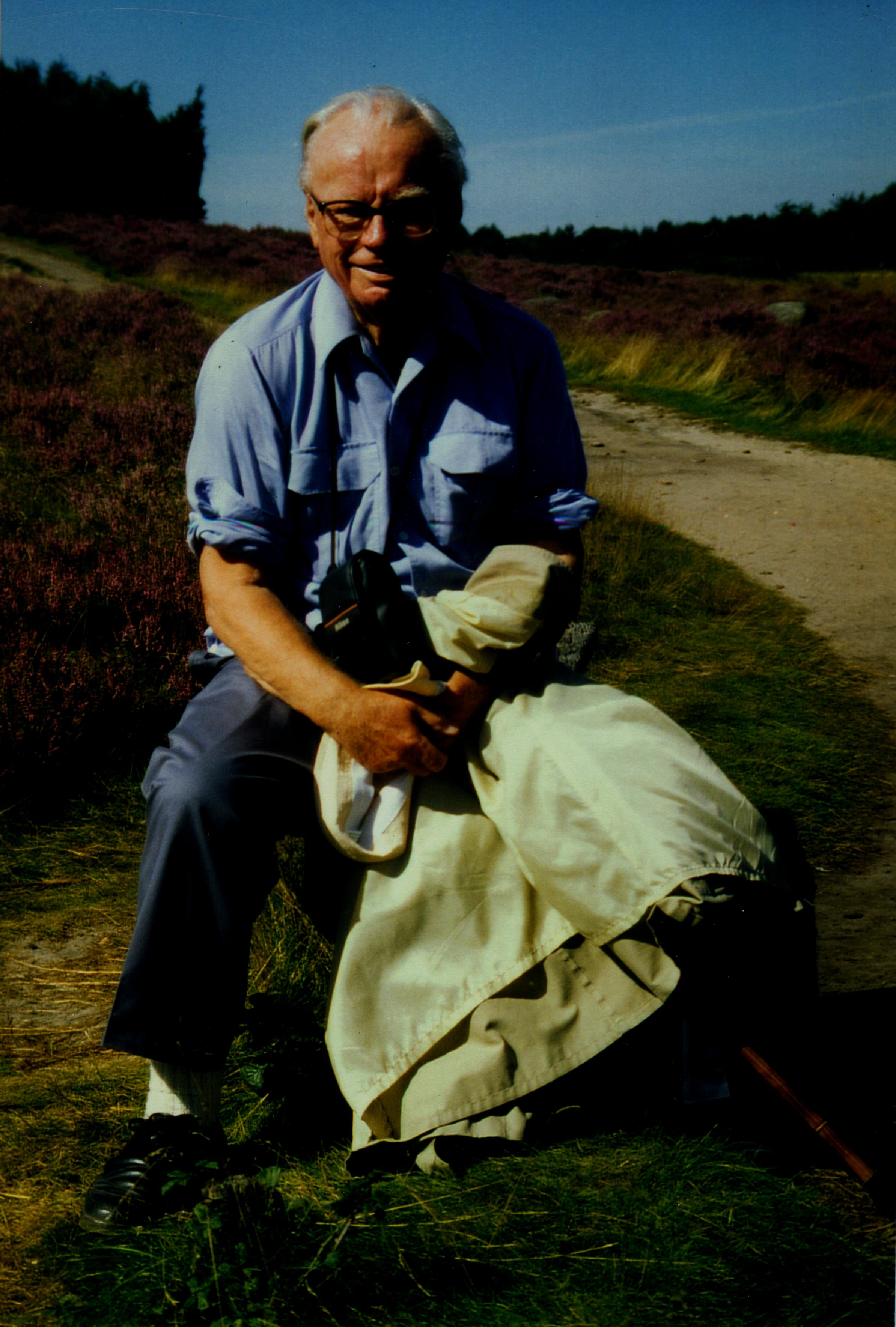 Dr. Rudolf Berndsen, 1965 - 75 Vorsitzender der DAV-Sektion Wiesbaden.